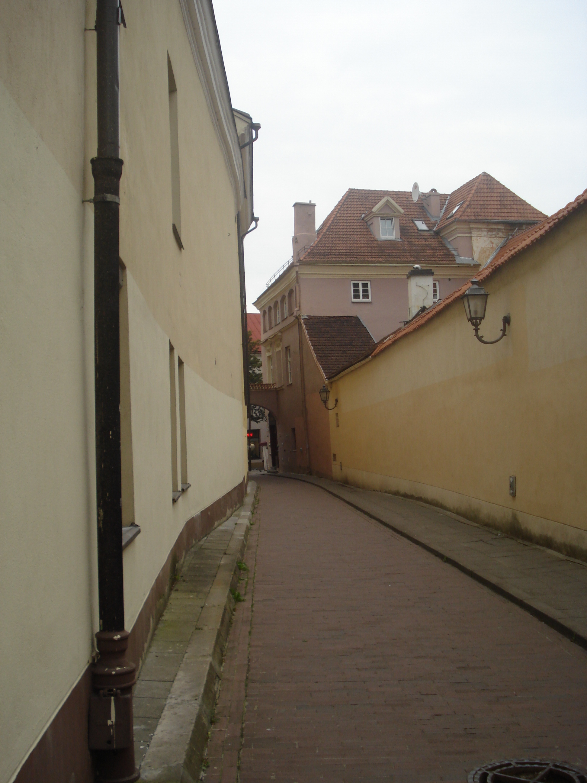 Bernardinų gatvė (Zaułek Bernardynski) in Vilnius